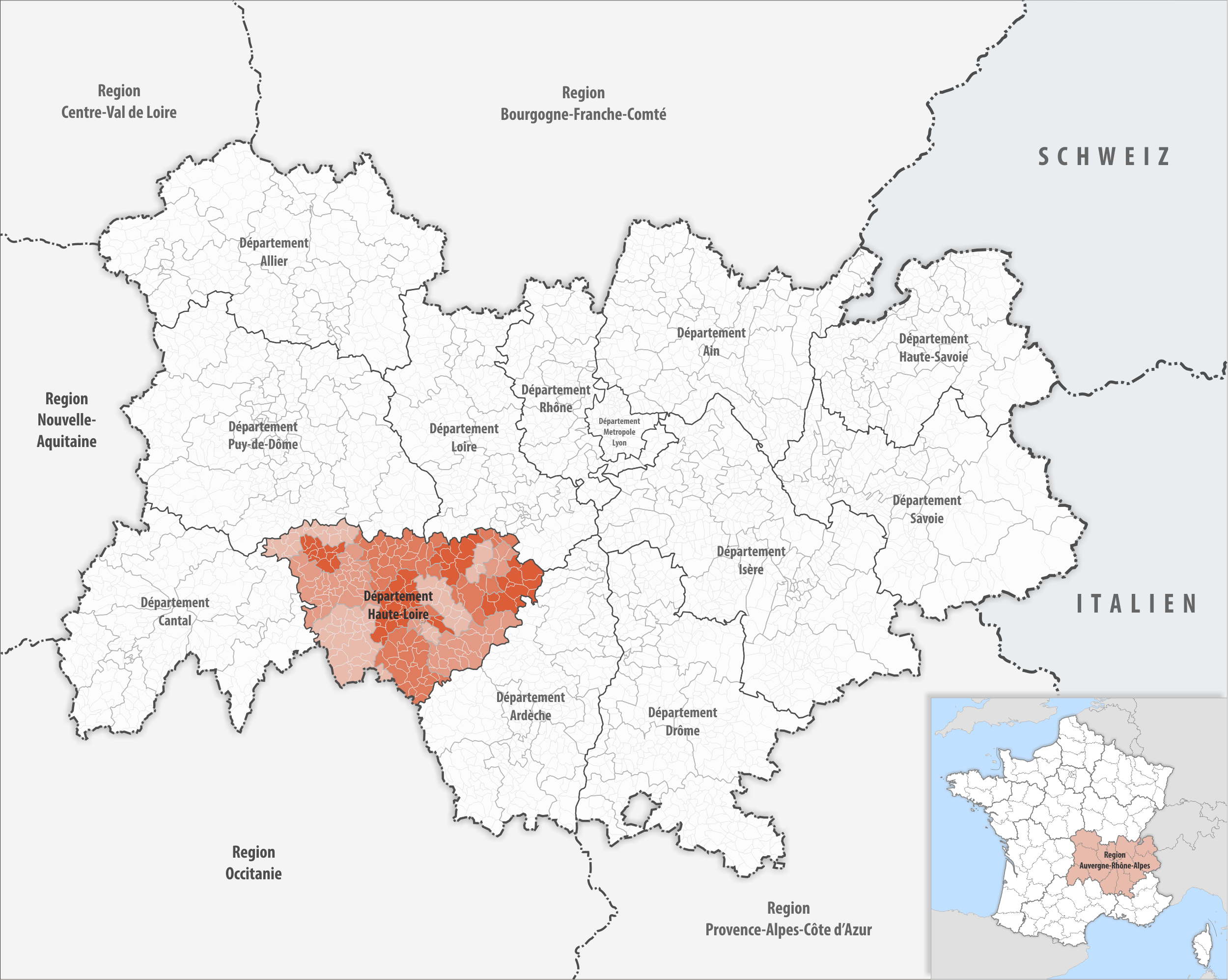 Lage des Departements Haute-Loire